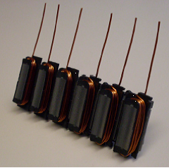 Mit Nadelwickeltechnik bewickelte Zahnkette